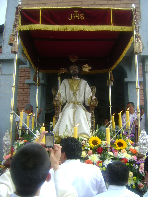 Imagen del siglo XVIII